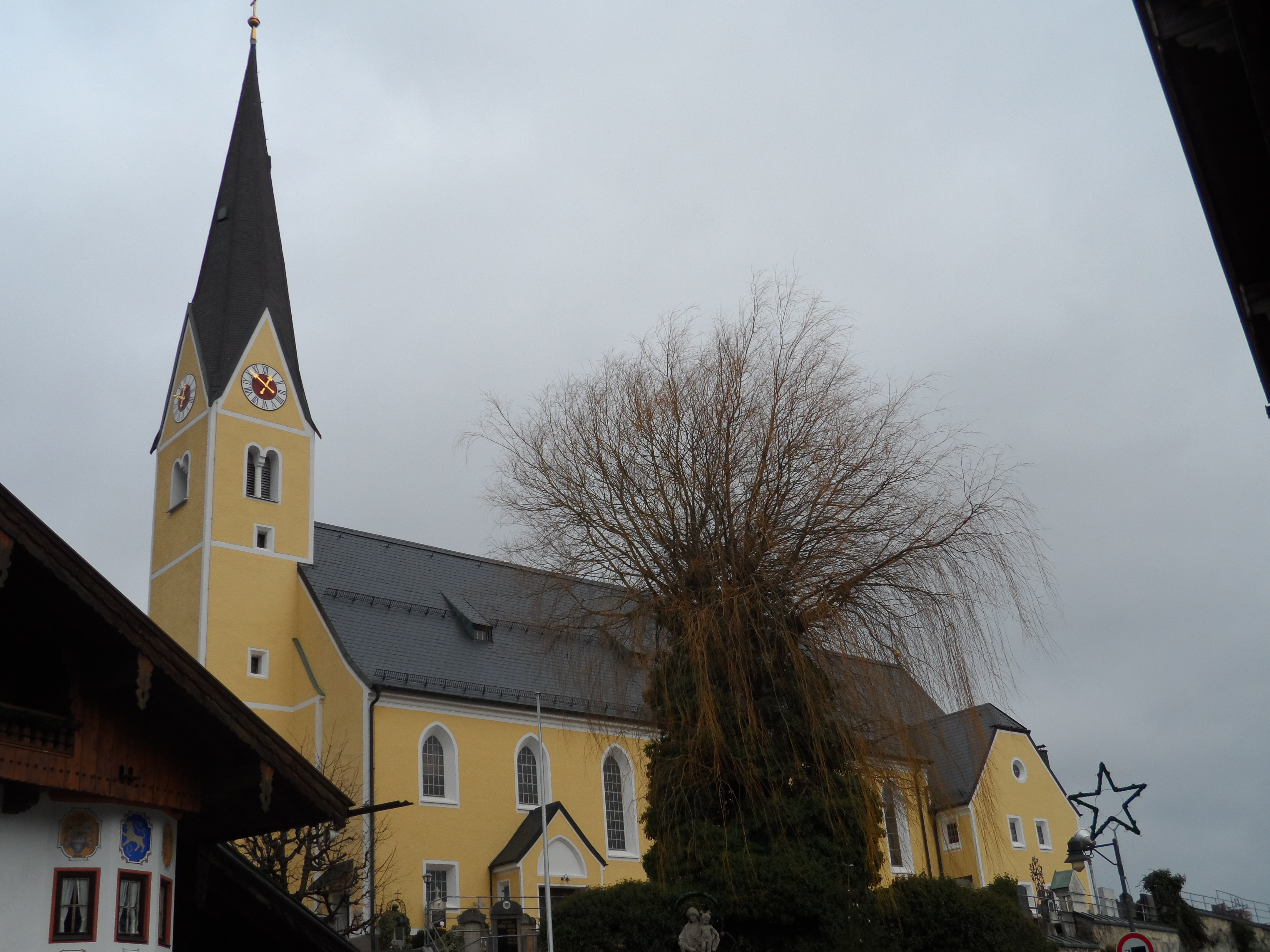 Katholische Pfarrkirche St. Laurentius - Bernau am Chiemsee